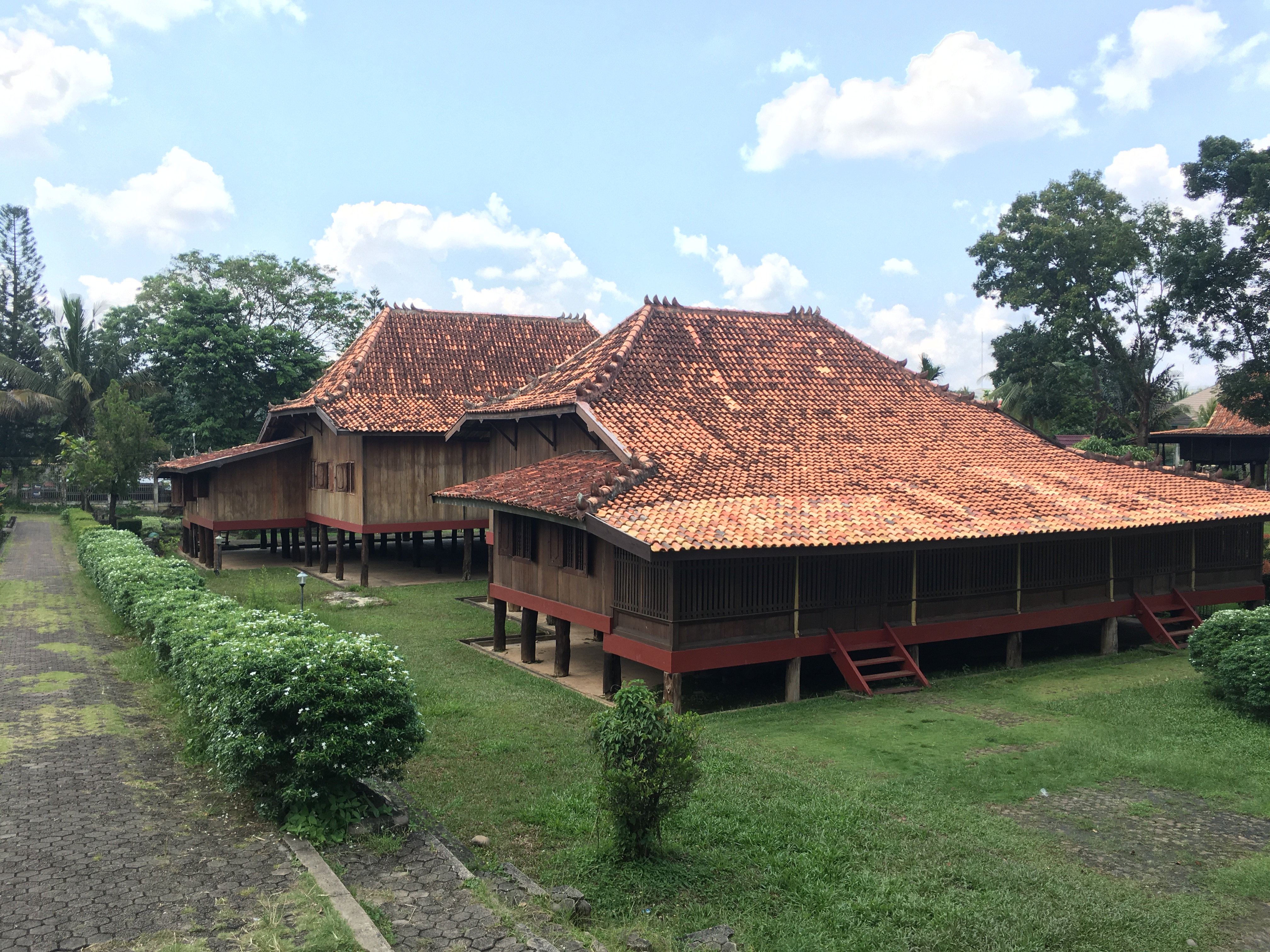 Replika Rumah Limas Palembang di Museum Balaputradewa, Palembang